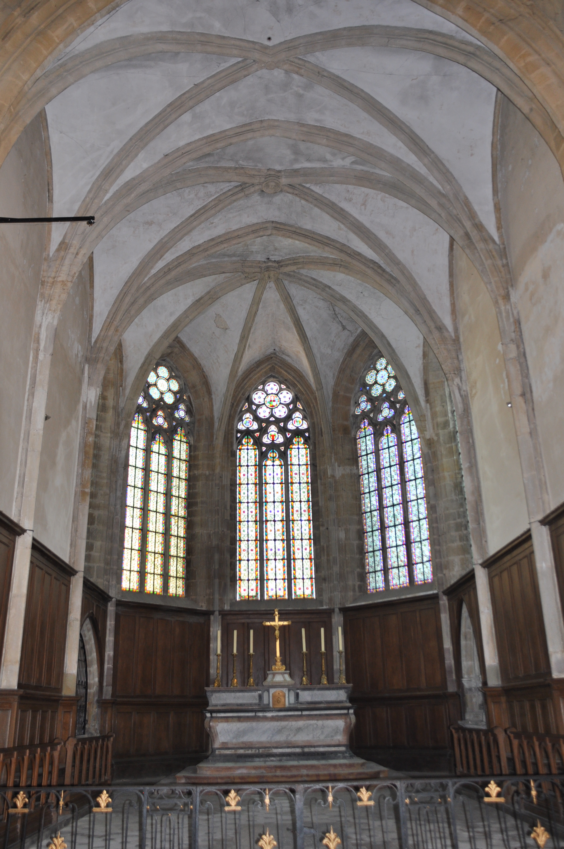 Faverney (Haute-Saône) - Abbaye .